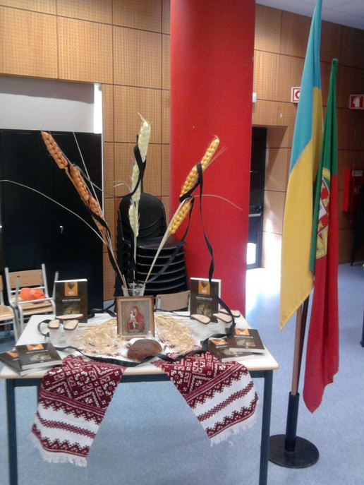 Призентація збірки наукових статей португальських істориків про голодомор в Україні - «Голодомор(1933—1933) - невідома українська трагедія», португальською мовою